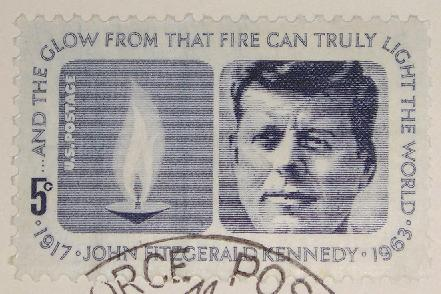 Timbre américain de mai 1964 en hommage au président John Fitzgerald Kennedy. Plus de précisions sur les auteurs et les commanditaires dans l'article Cinq cents John Kennedy.